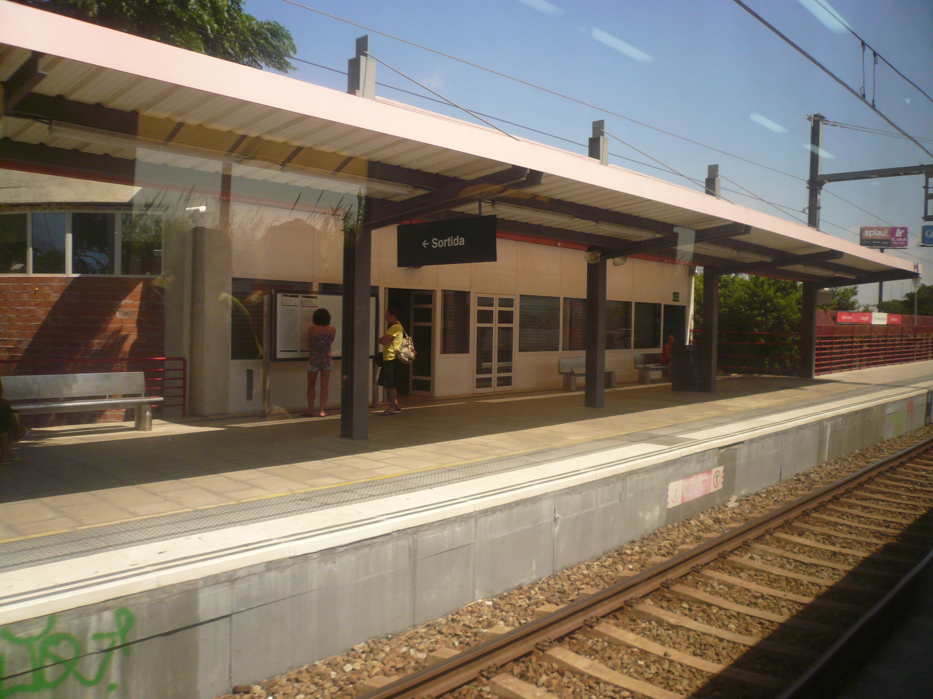 Estació de Viladecans, vista des del tren